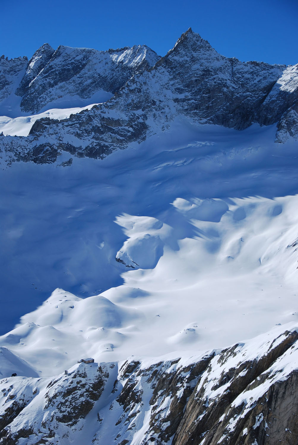 Blick von einer Tour zum Golegghorn nach Südwesten über die Gruebenhütte (2512 m) und den Gruebengletscher zum Grossen Diamantstock (3162 m), dahinter der Bächlistock (3247 m).